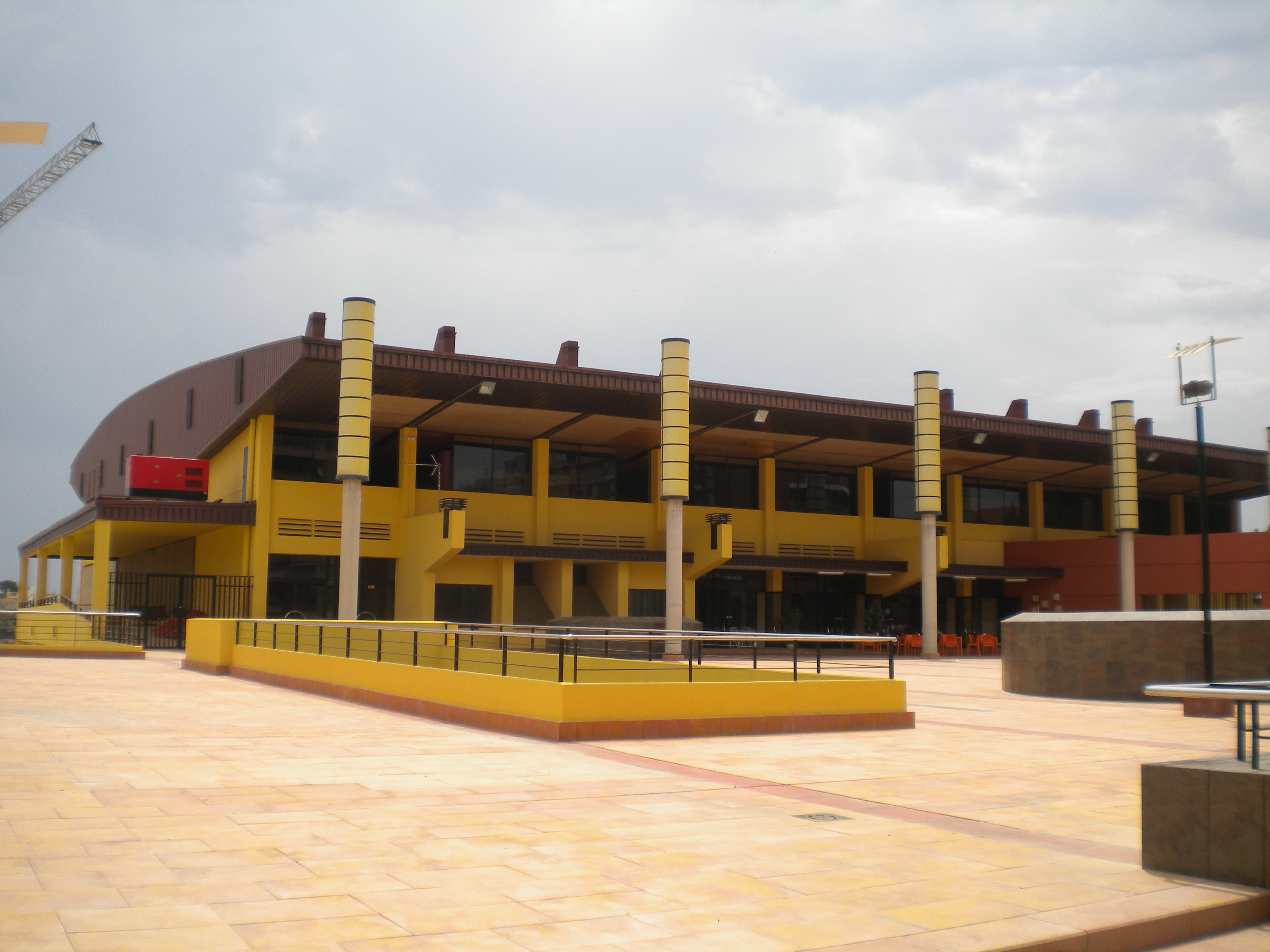 Pabellón Polideportivo Centro de El Campello (Alicante, España)